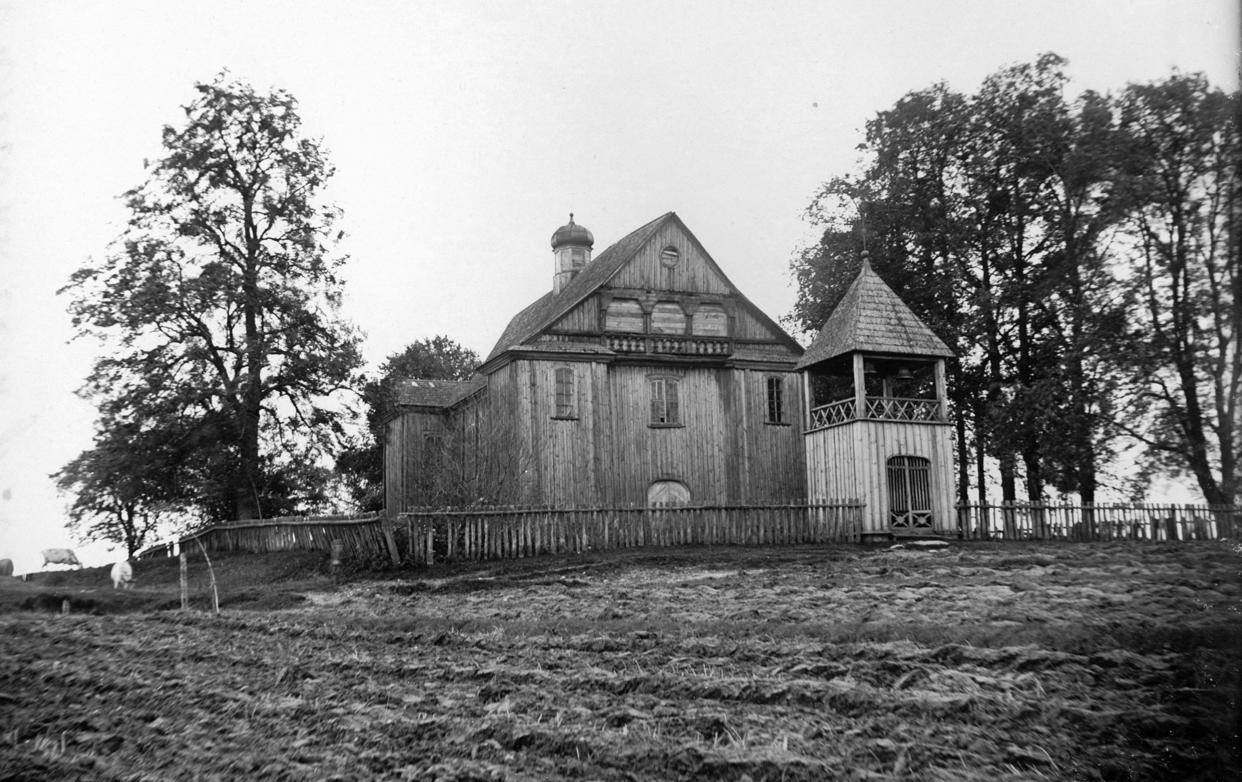 Беларуская (тарашкевіца): Валеўка (Valeŭka). Былы касьцёл дамініканаў.